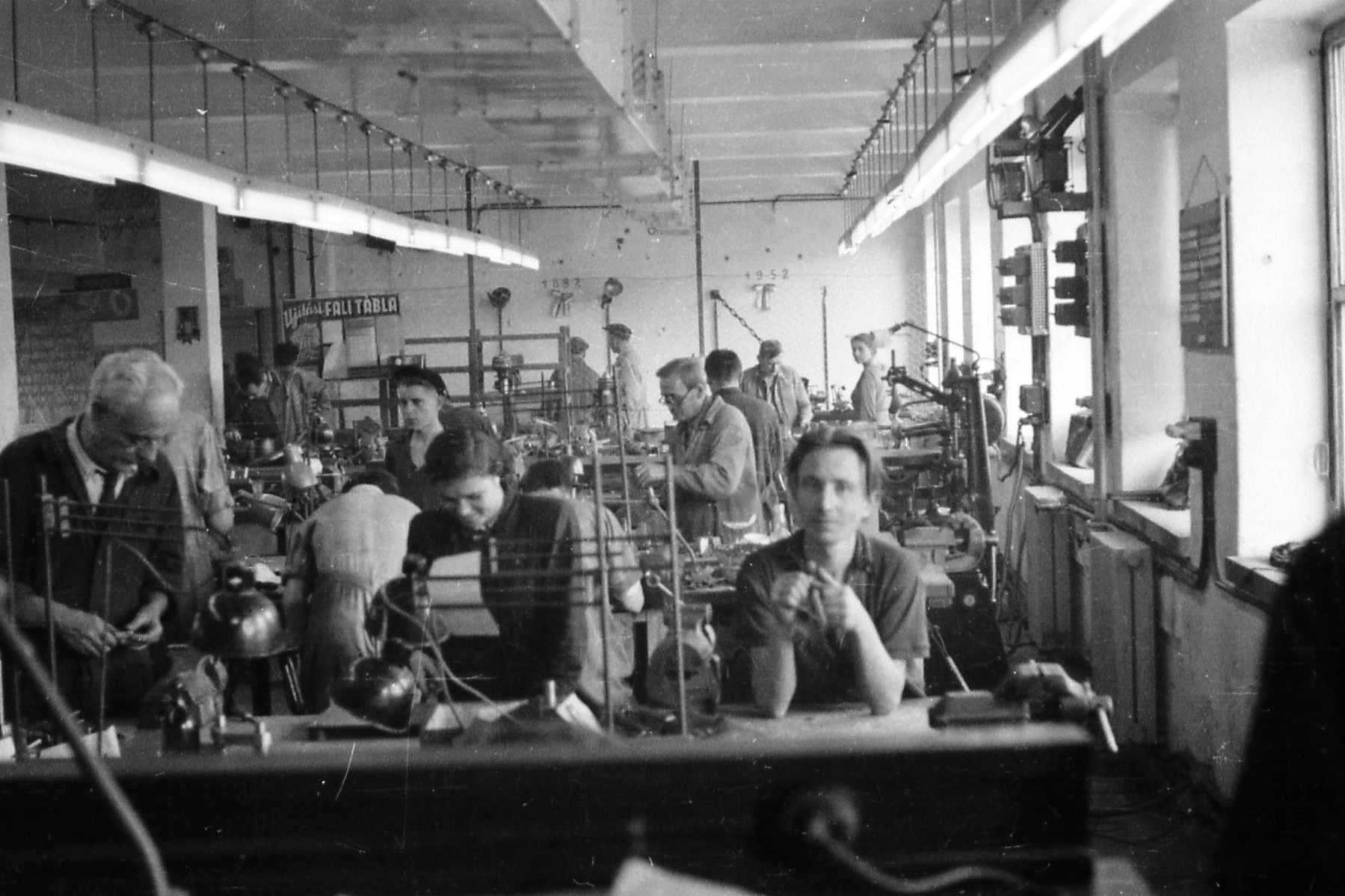 A Magyar Siemens-Schuckert Művek előkészítő műhelye.